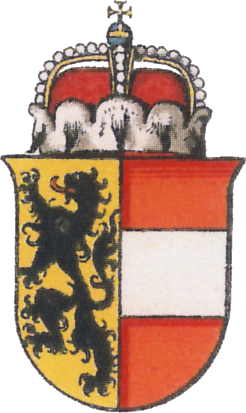 "Fig. 6. Wappen des Herzogtums Salzburg. Schild gespalten; vorn in Gold ein schwarzer Löwe, hinten in Rot eine silberne Binde. Auf dem Schilde ruht ein alter Herzogshut, der jetzt als Fürstenhut angesprochen wird. Das seit 1. Januar 1850 ein selbstständiges Kronland bildende alte Erzbistum führt seit Erzbischof Eberhard II. (1200-1246) das hohenstaufische (?) und österreichische Wappenbild im Schilde vereint."